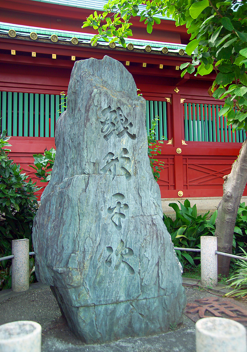 Monument to the jidaigeki character Zenigata Heiji at Kanda Myojin Shinto Shrine, Bunkyo-ku, Tokyo, Japan.